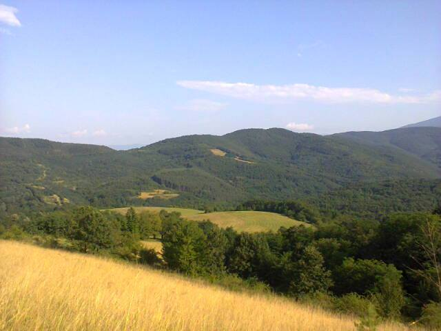 Прекрасна природа